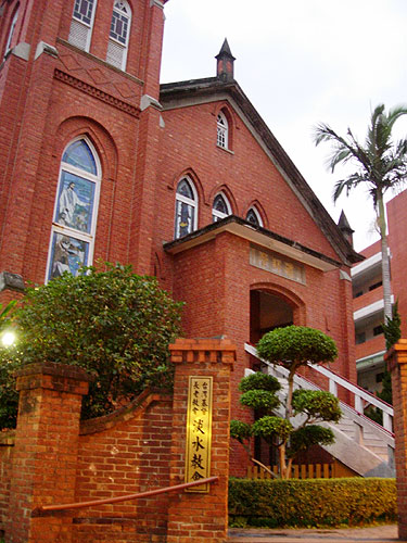 Danshuei-Church-1932